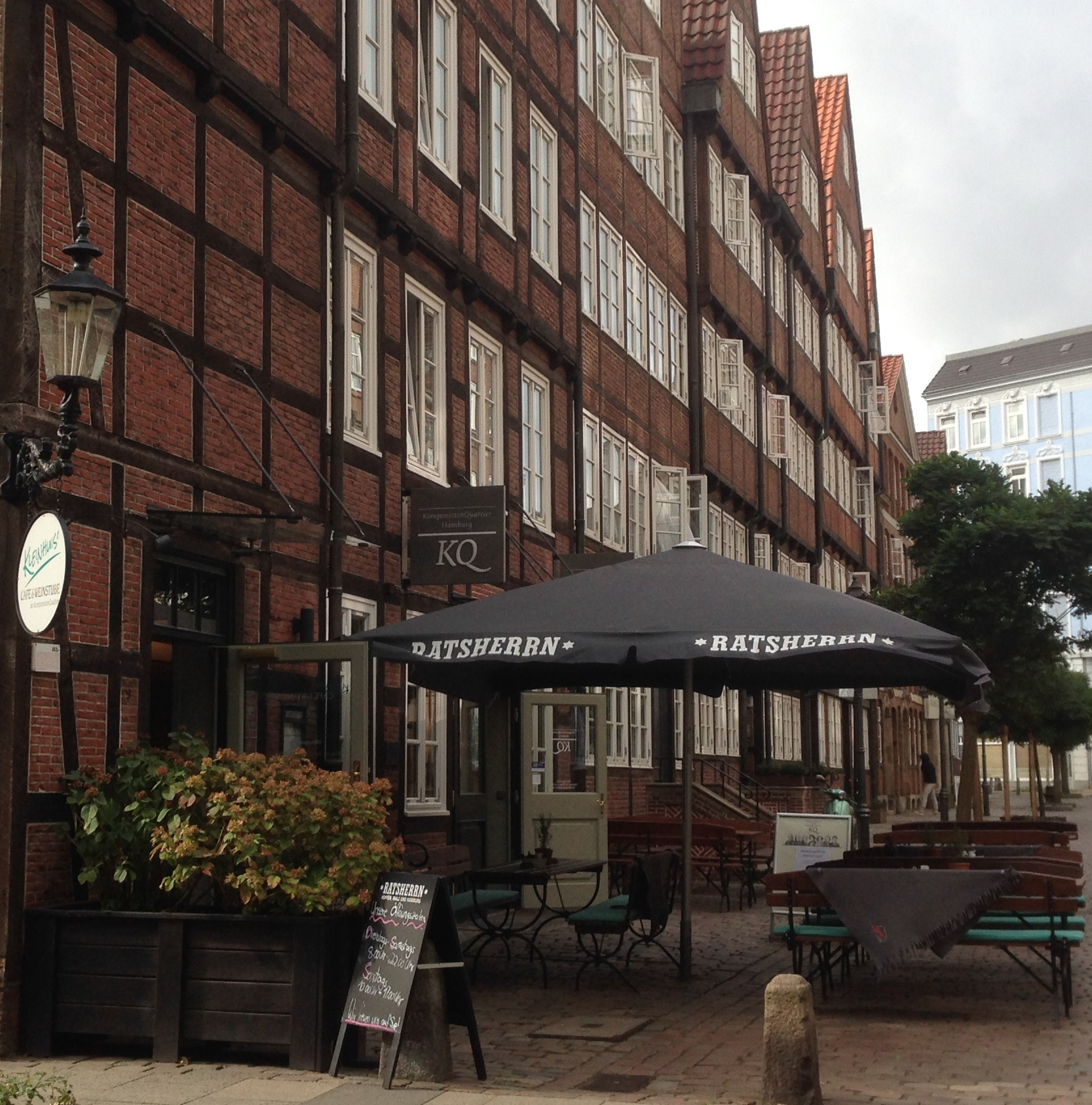 Peterstraße 29 Hamburg, KomponistenQuartier Hamburg